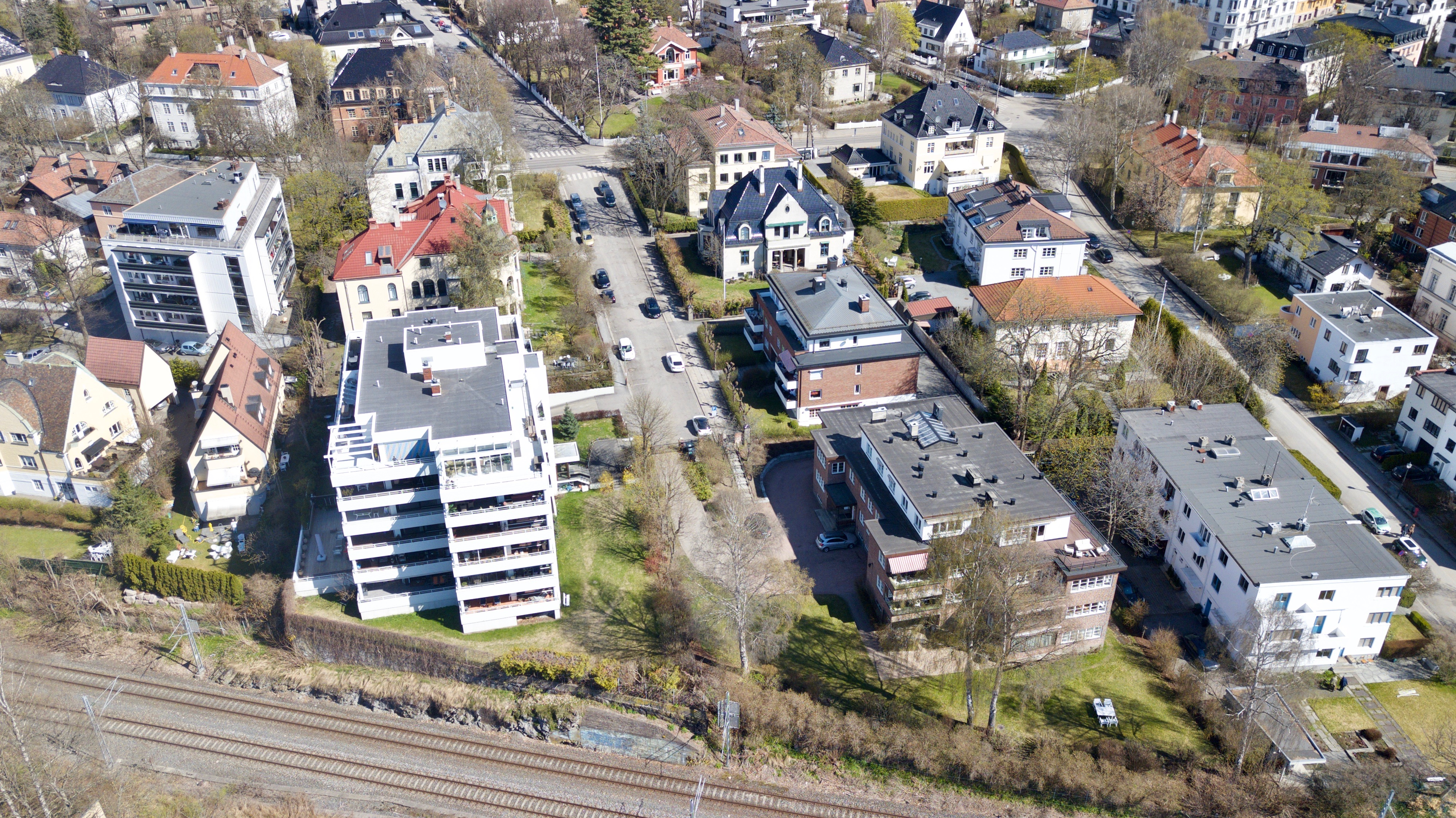 Hafrsfjordgata i Oslo.